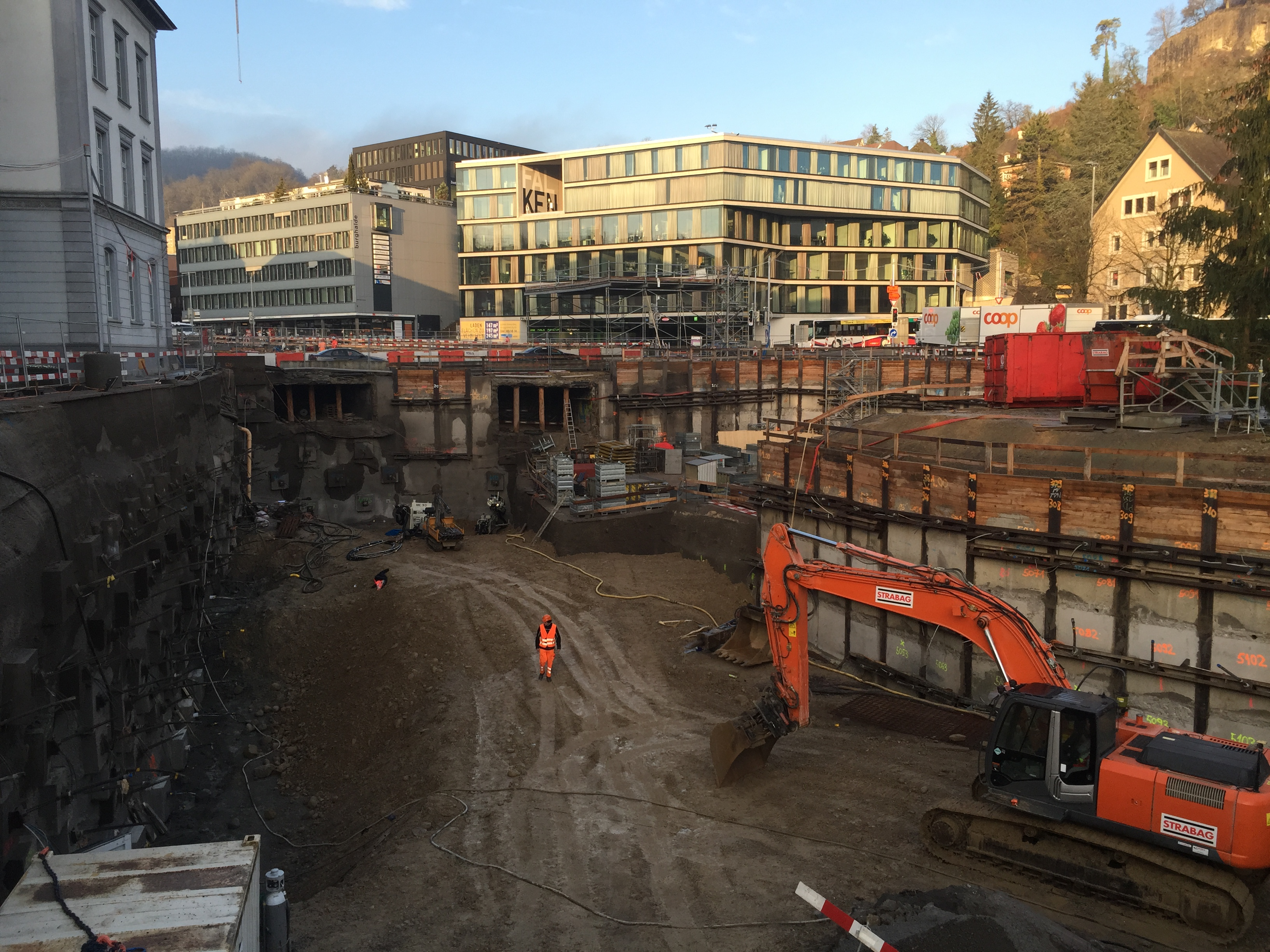 Schulhausplatz Baden während der Bauarbeiten Ende 2015